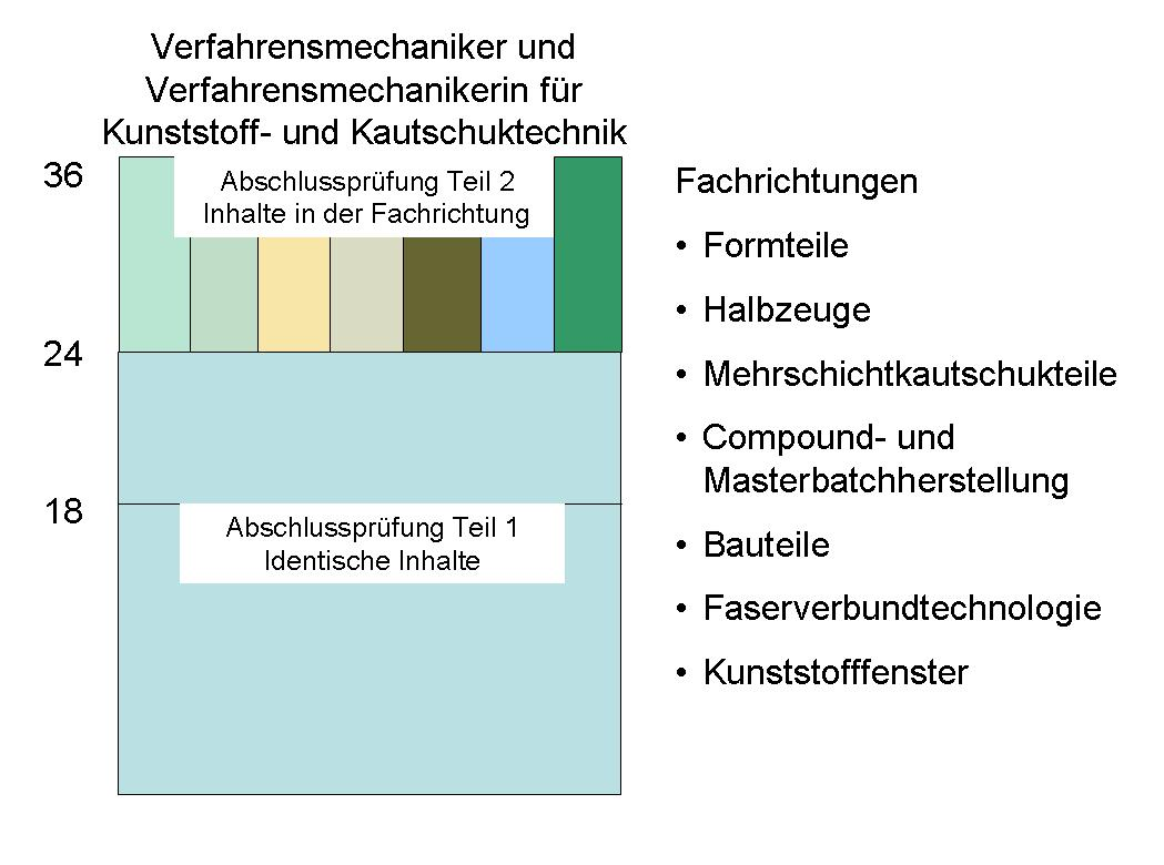 Struktur des Verfahrensmechanikers für Kunststoff- und Kautschuktechnik (Ausbildungsordnung aus dem Jahr 2012). Die Ausbildungsdauer des Berufes beträgt 36 Monate. Im dritten Ausbildungsjahr erfolgt eine Binnendifferenzierung in Fachrichtungen.